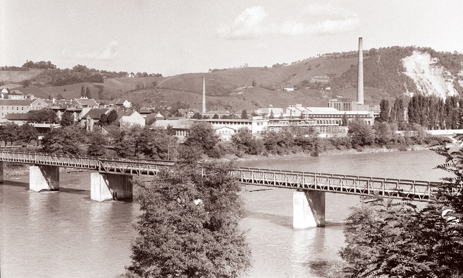 Meljski most